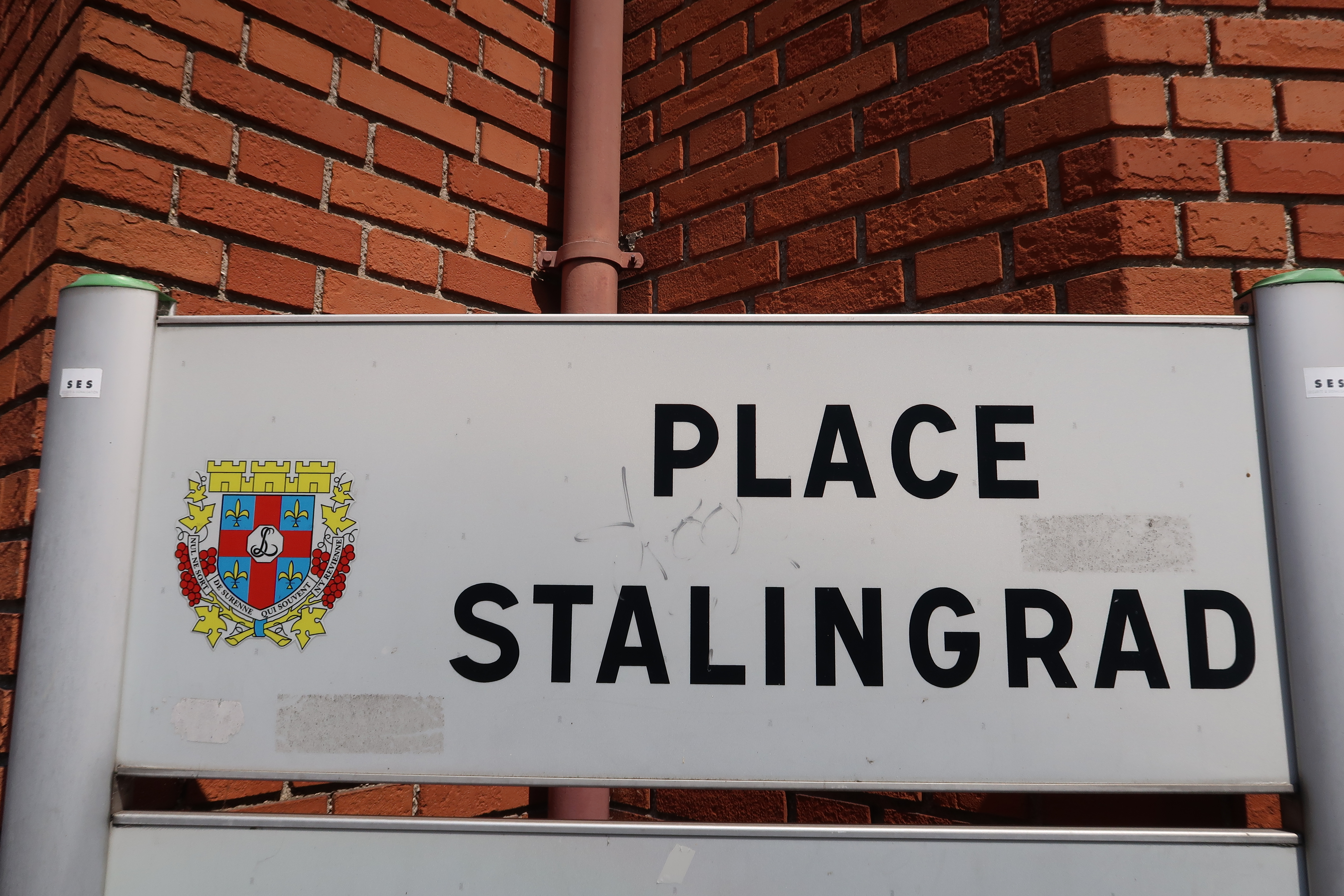 Plaque de la place Stalingrad à Suresnes (Hauts-de-Seine).